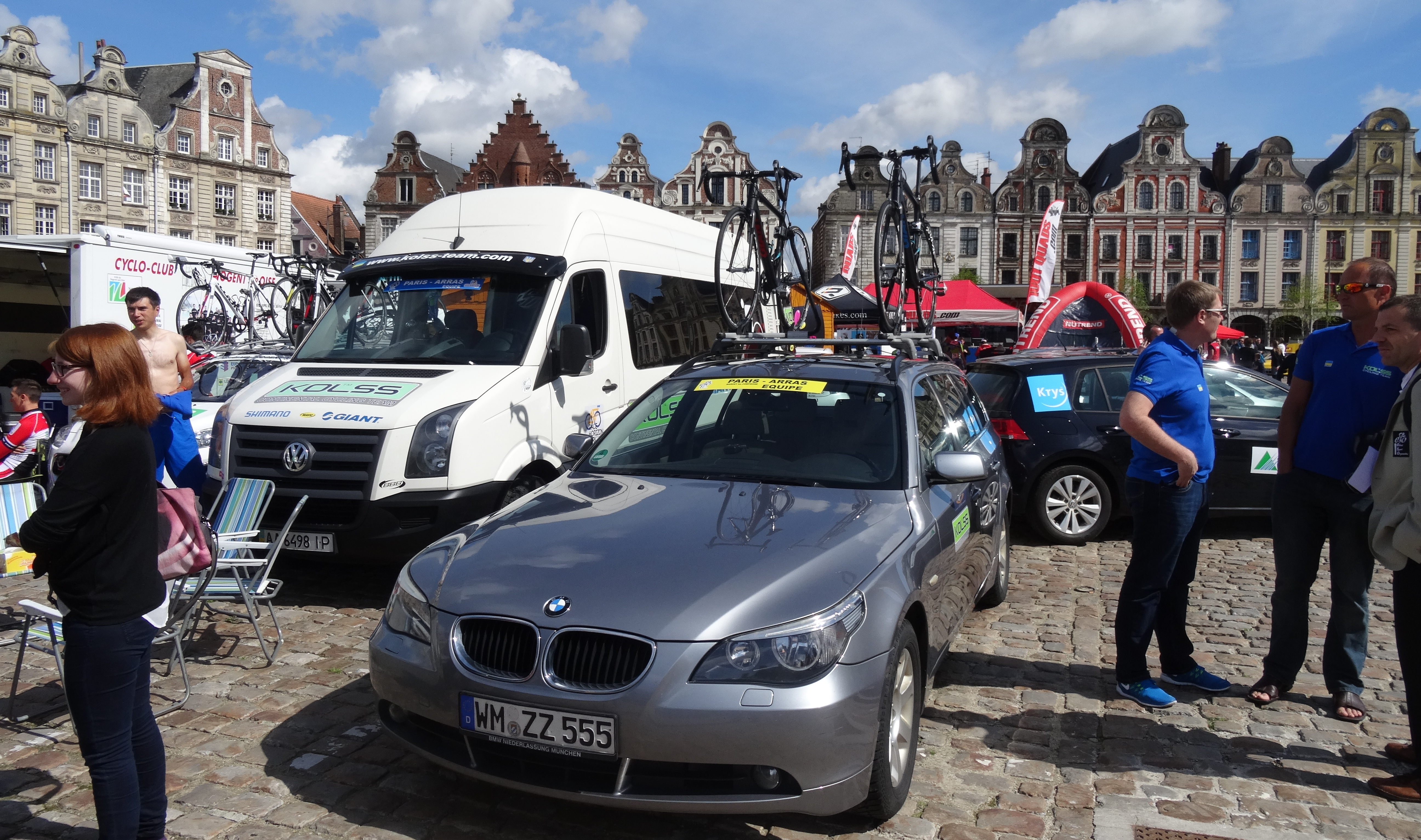 Reportage photographique réalisé le dimanche 25 mai 2014 à l'occasion du départ et de l'arrivée de la troisième étape du Paris-Arras Tour 2014 à Arras, Pas-de-Calais, Nord-Pas-de-Calais, France.